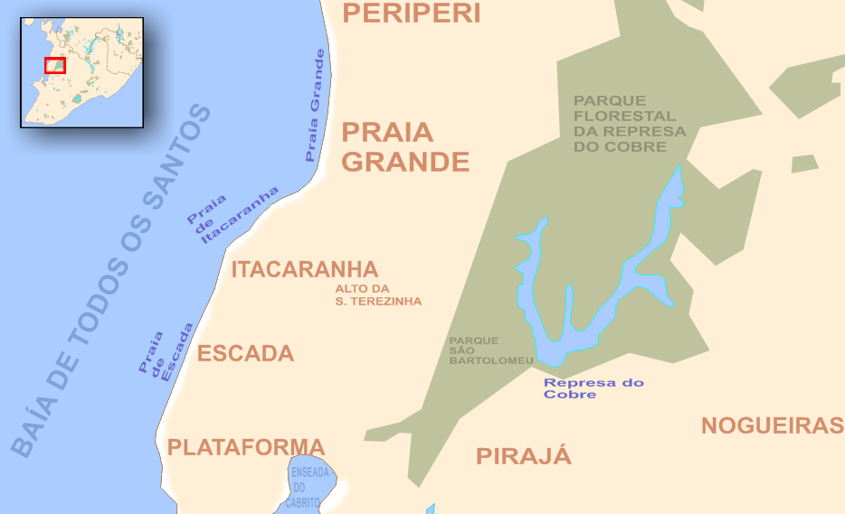 Mapa de Salvador (Bahia, Brazil) - Praias: Escada, Itacaranha, Grande, Parques São Bartomeu e Florestal da Represa do Cobre.